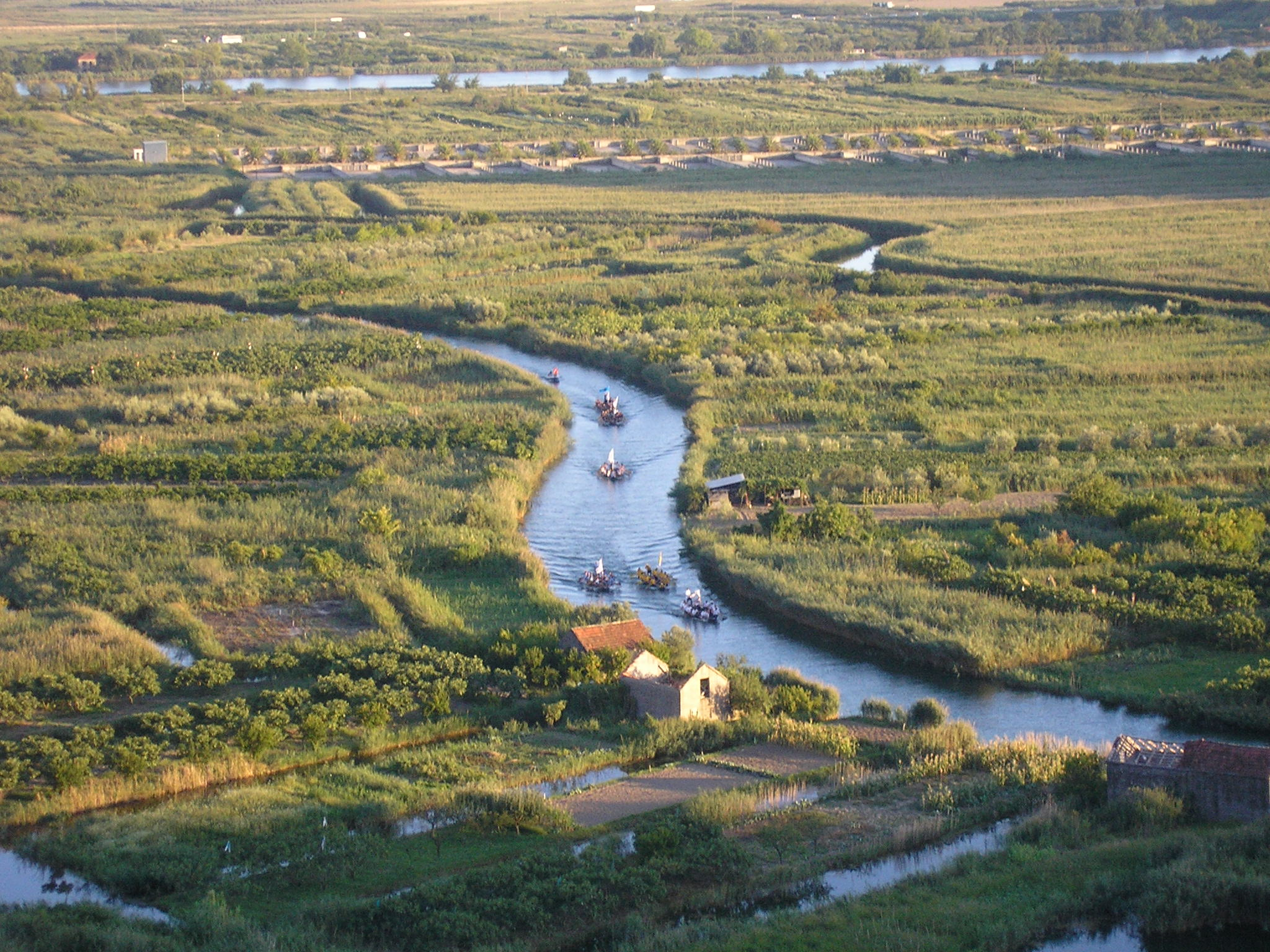 Lađari u Crnoj rijeci (Maraton lađa 2011.)